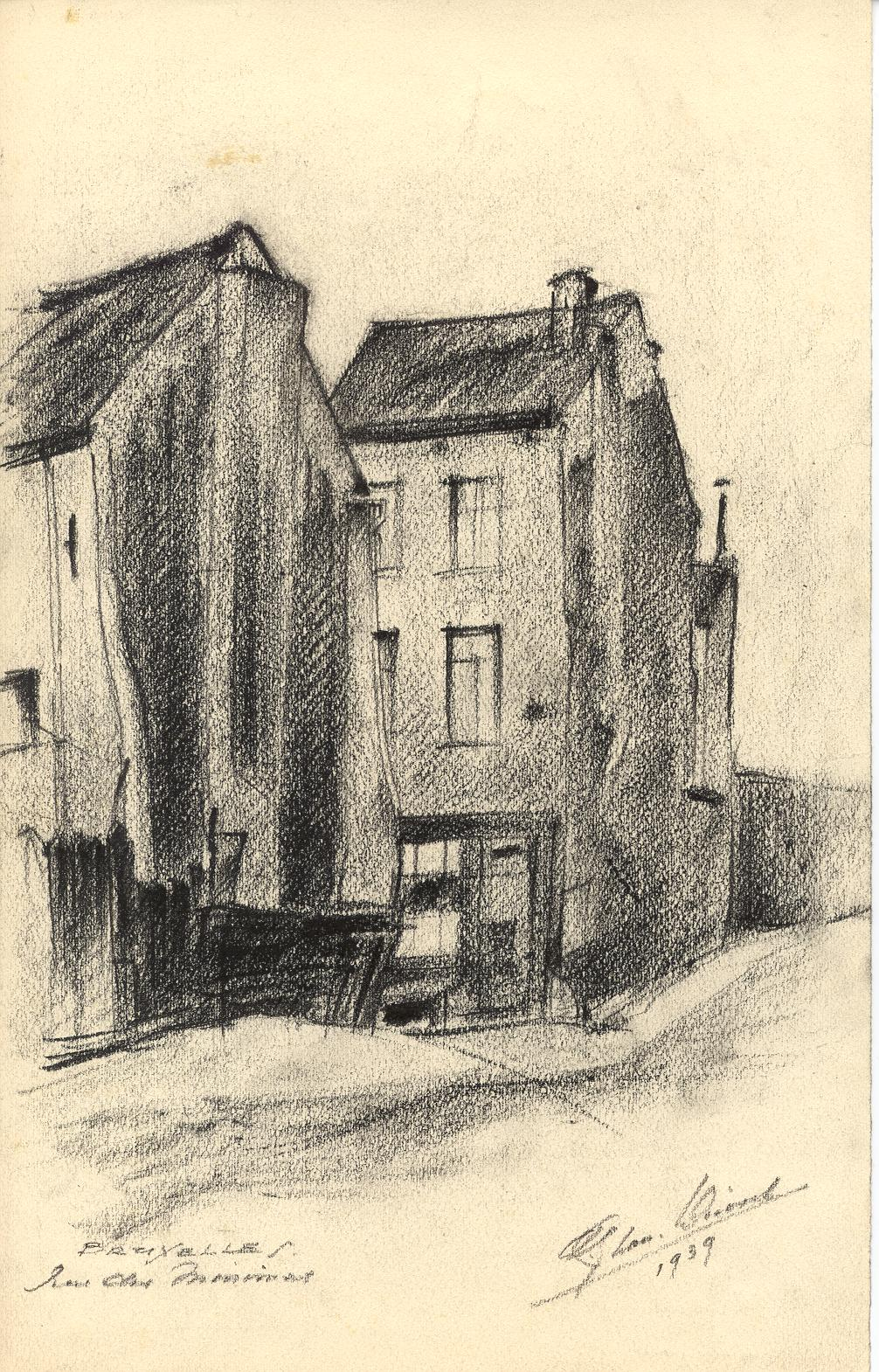 La rue des Minimes à Bruxelles, dessin du 30 septembre 1939 par l'architecte Léon van Dievoet.